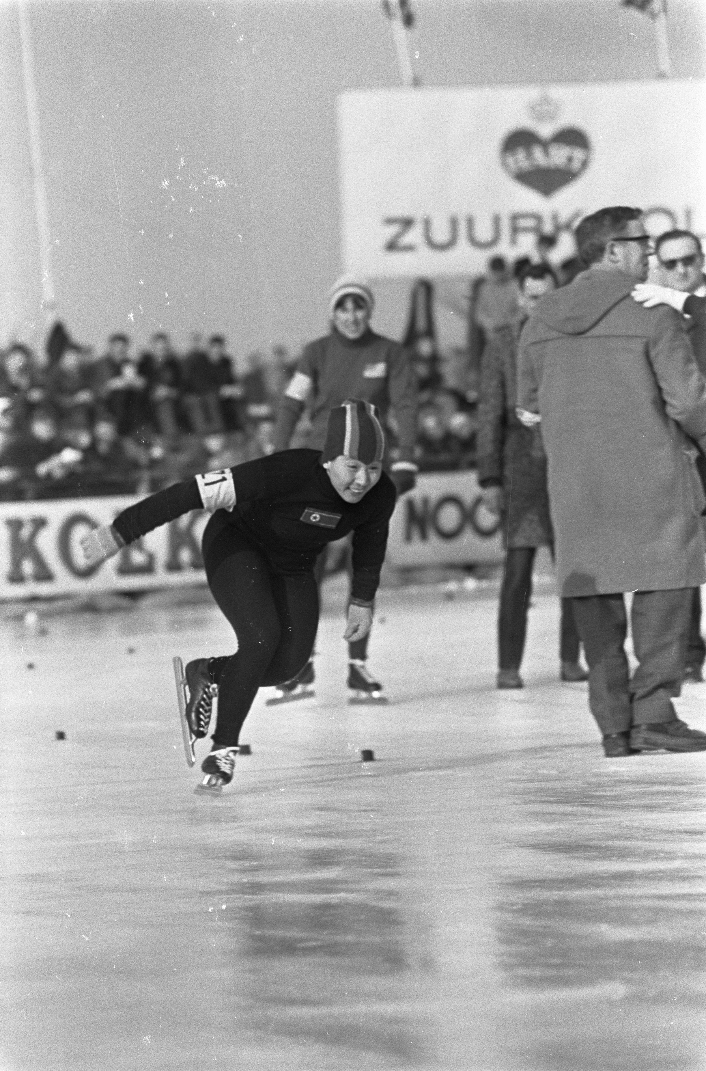 Collectie / Archief : Fotocollectie Anefo Reportage / Serie : [ onbekend ] Beschrijving : [Wereldkampioenschap schaatsen allround vrouwen], Ko Kyung Hi (Noord-Korea) Datum : 20 februari 1967 Trefwoorden : schaatsen, sport Fotograaf : Kroon, Ron / Anefo, [onbekend] Auteursrechthebbende : Nationaal Archief Materiaalsoort : Negatief (zwart/wit) Nummer archiefinventaris : bekijk toegang 2.24.01.05 Bestanddeelnummer : 920-0950